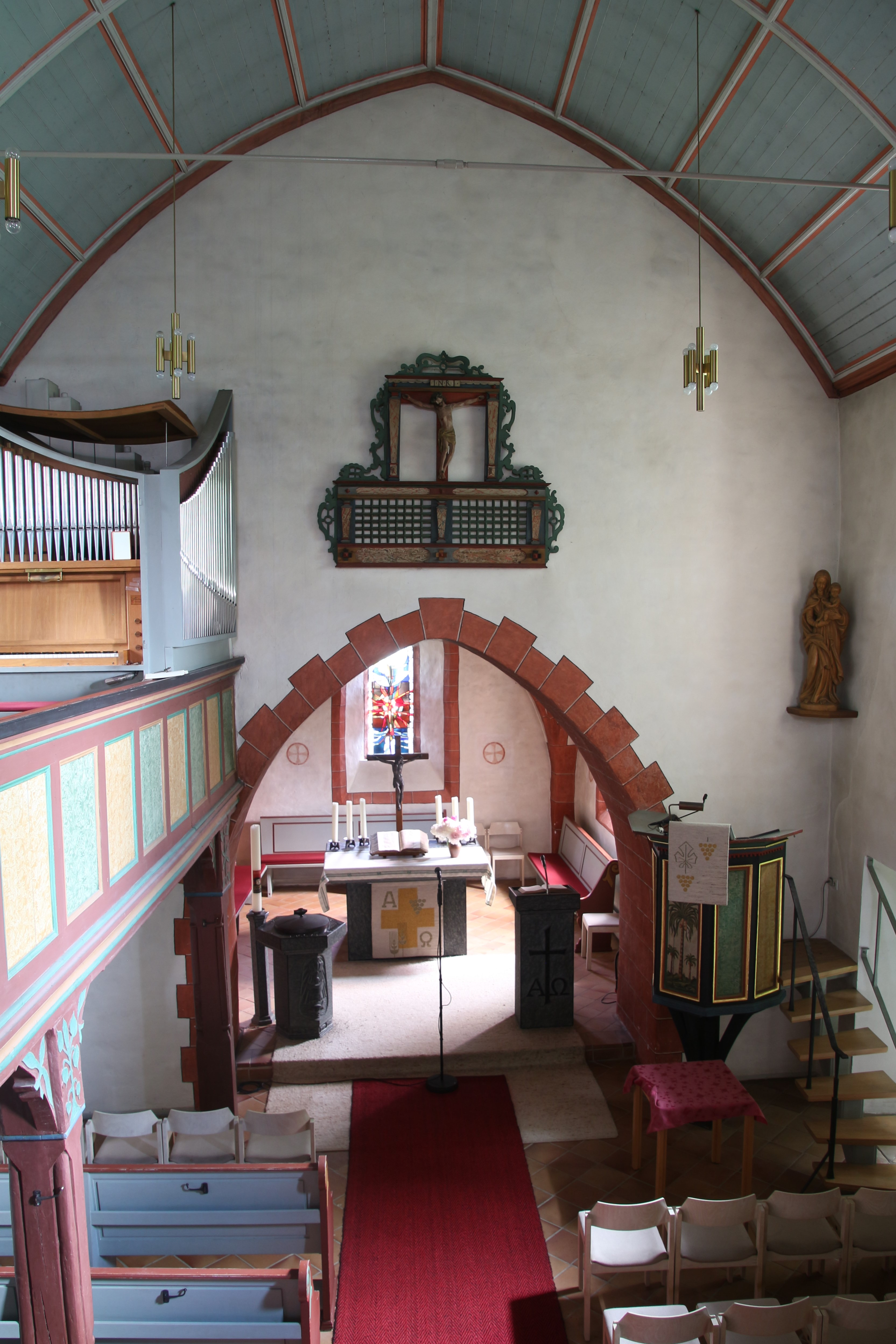 Evangelische Kirche Lixfeld, Landkreis Marburg-Biedenkopf, Hessen